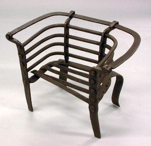 Brandrooster, vroeger vuurijzer genoemd, ijzer, 31x33x20 cm